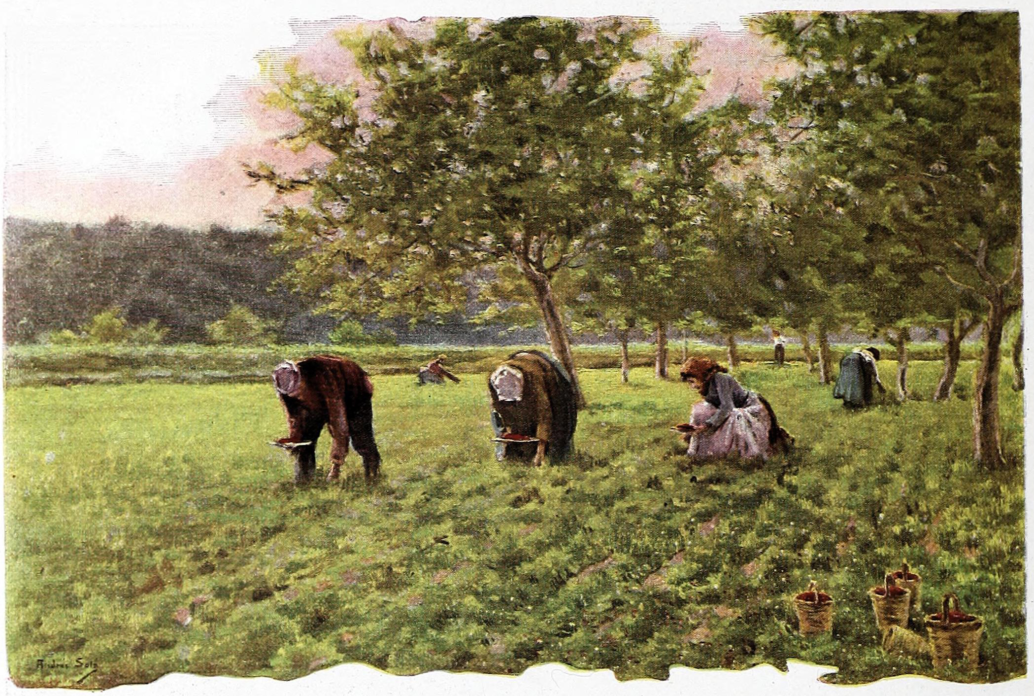 Las fresas.